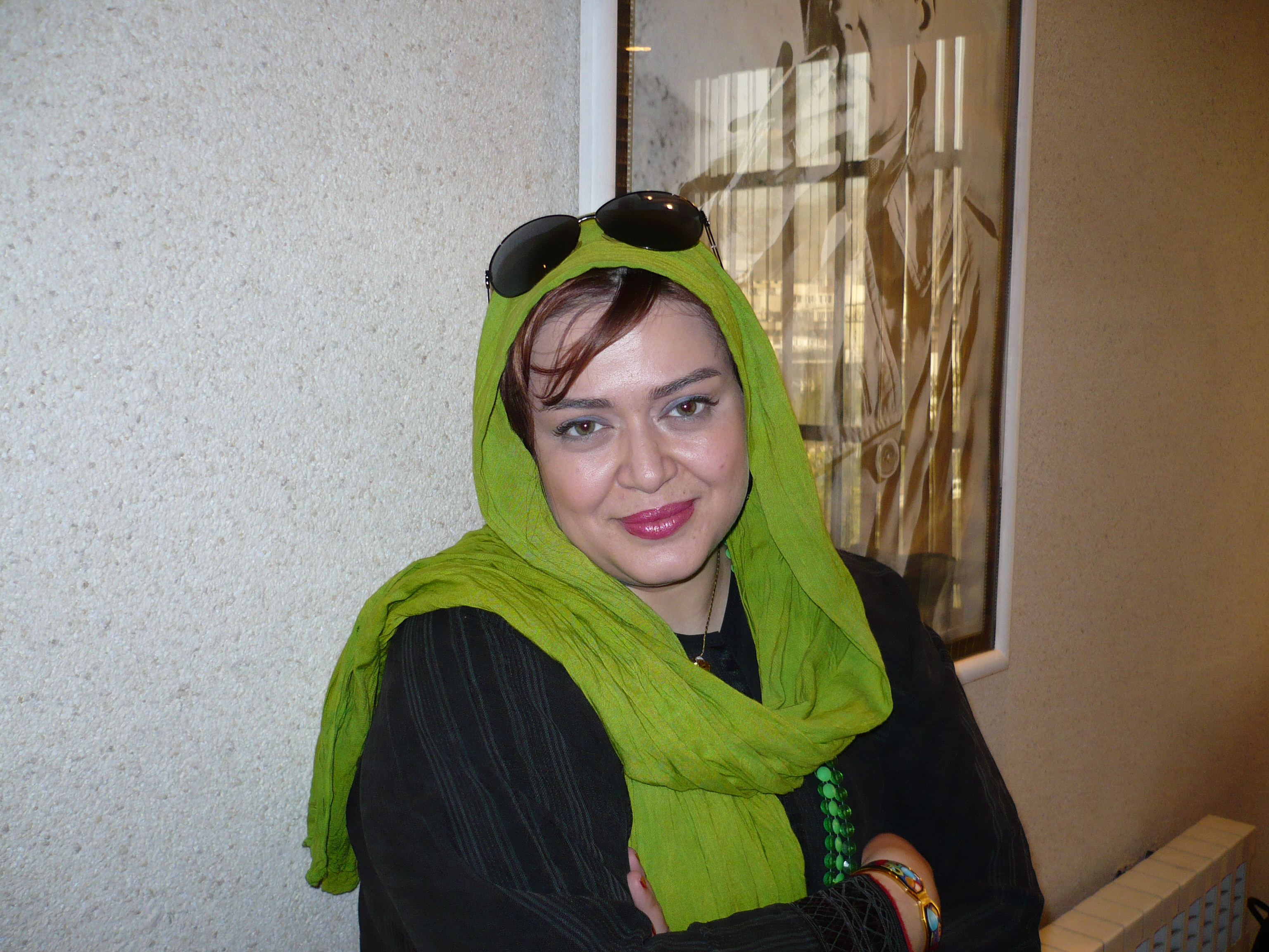 Bahareh Rahnama is an iranian actress.